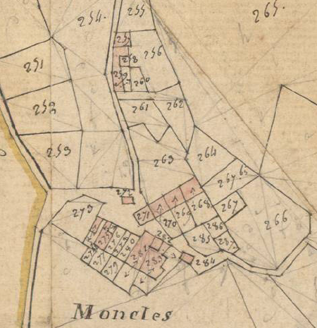 Moncles en el Cadastre napoleònic del 1812 (Arxius Departamentals dels Pirineus Orientals)